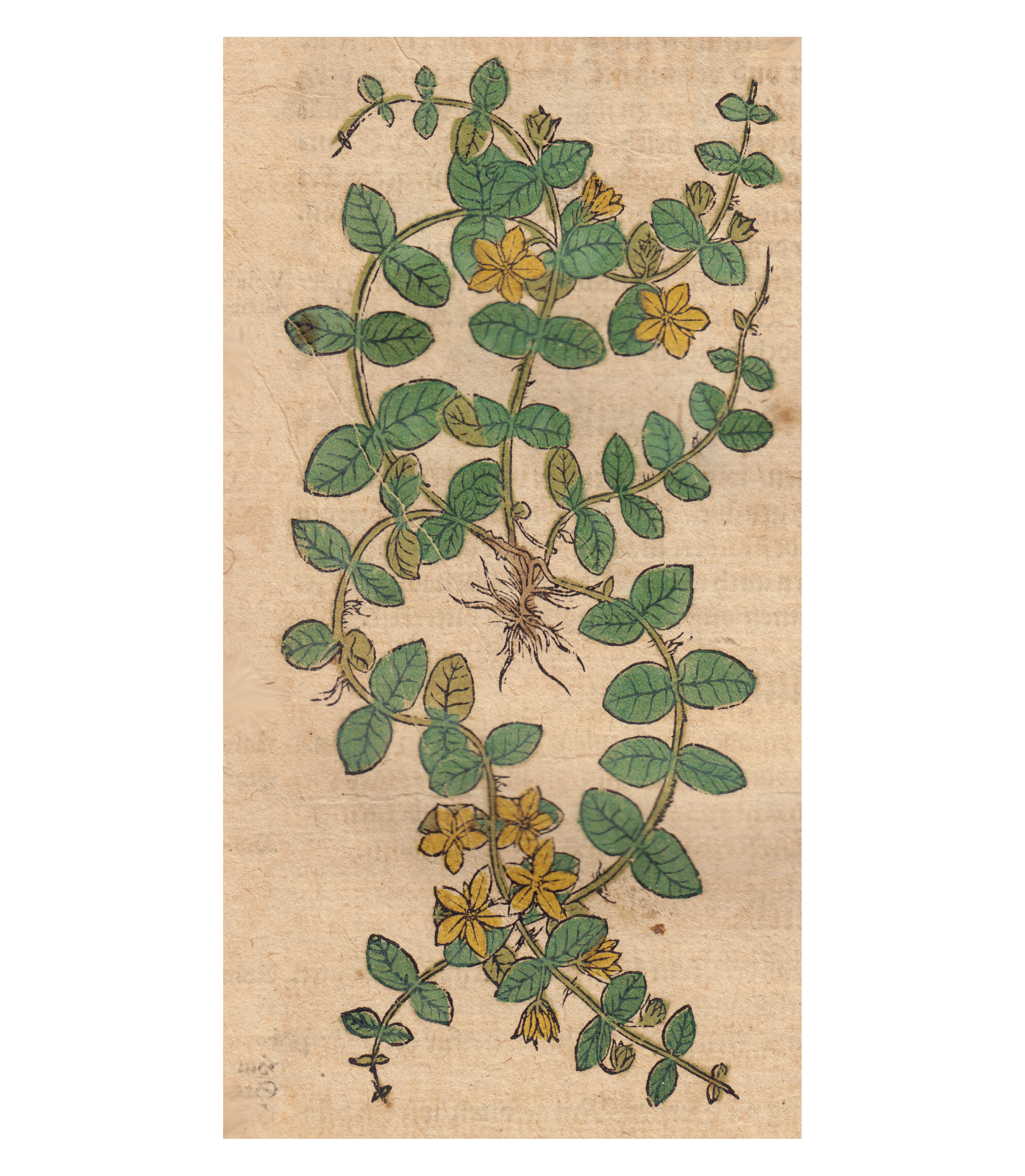 Abbildung von Lysimachia nummularia